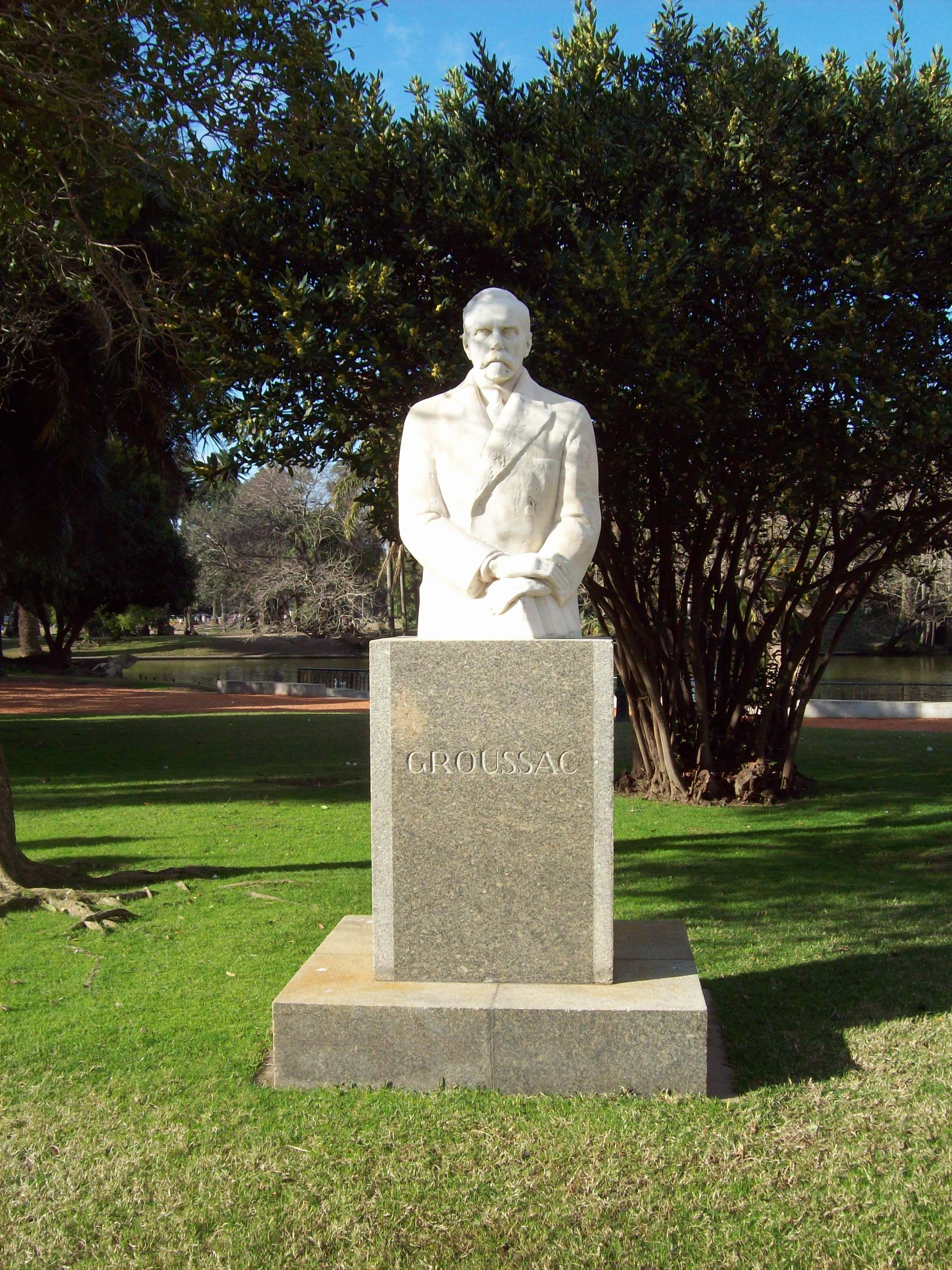 Monumento al escritor franco-argentino Paul Groussac en los Parques de Palermo.